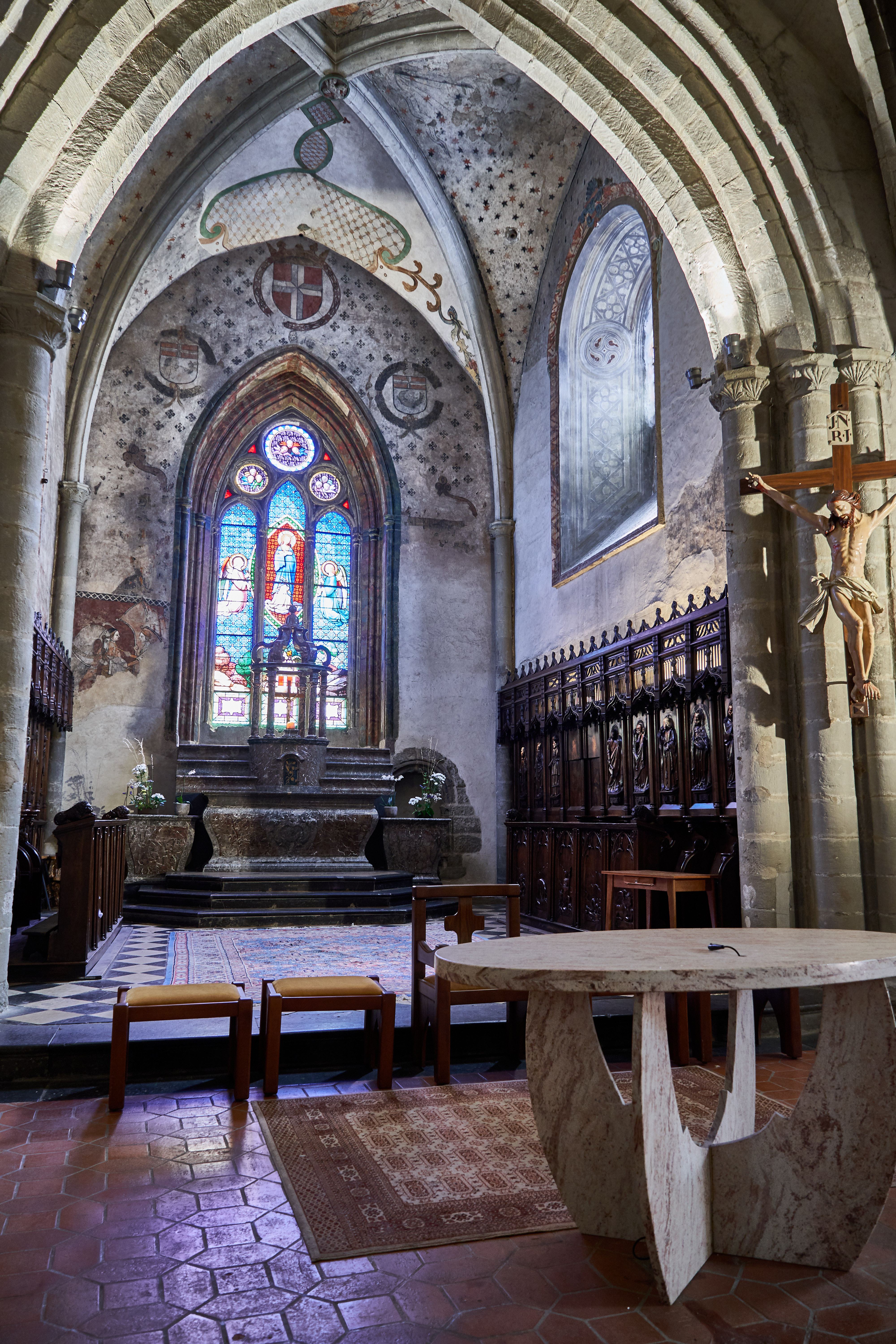 Evian - Église Notre-Dame de l'Assomption - Chapelle